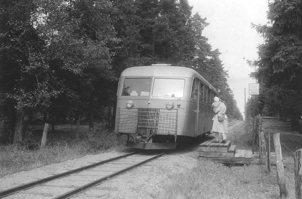 En rälsbuss gör uppehåll vid Myrberga Hållplats utmed Slite-Roma Järnväg på Gotland.